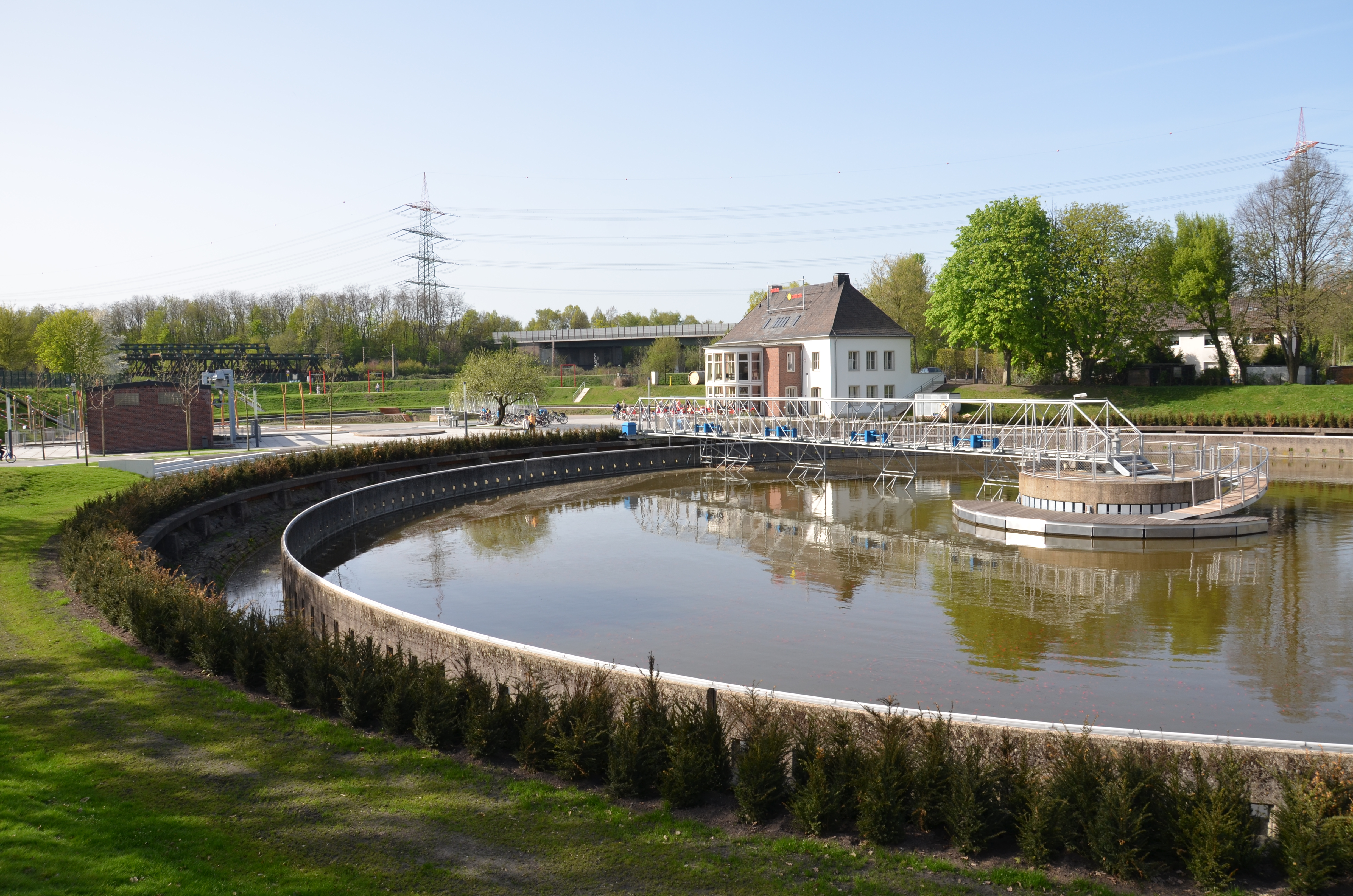 BernePark in Bottrop-Ebel an der Mündung der Berne in die Emscher, auf dem Gelände der ehemaligen Kläranlage Bernemündung Wasserbecken